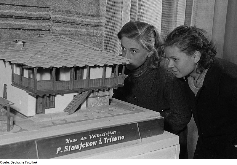 Original image description from the Deutsche Fotothek Zwei Mädchen betrachten ein Modell des Hauses des Dichters Pentscho Slawejkow in Trjawna in einer bulgarischen Volkskunstausstellung